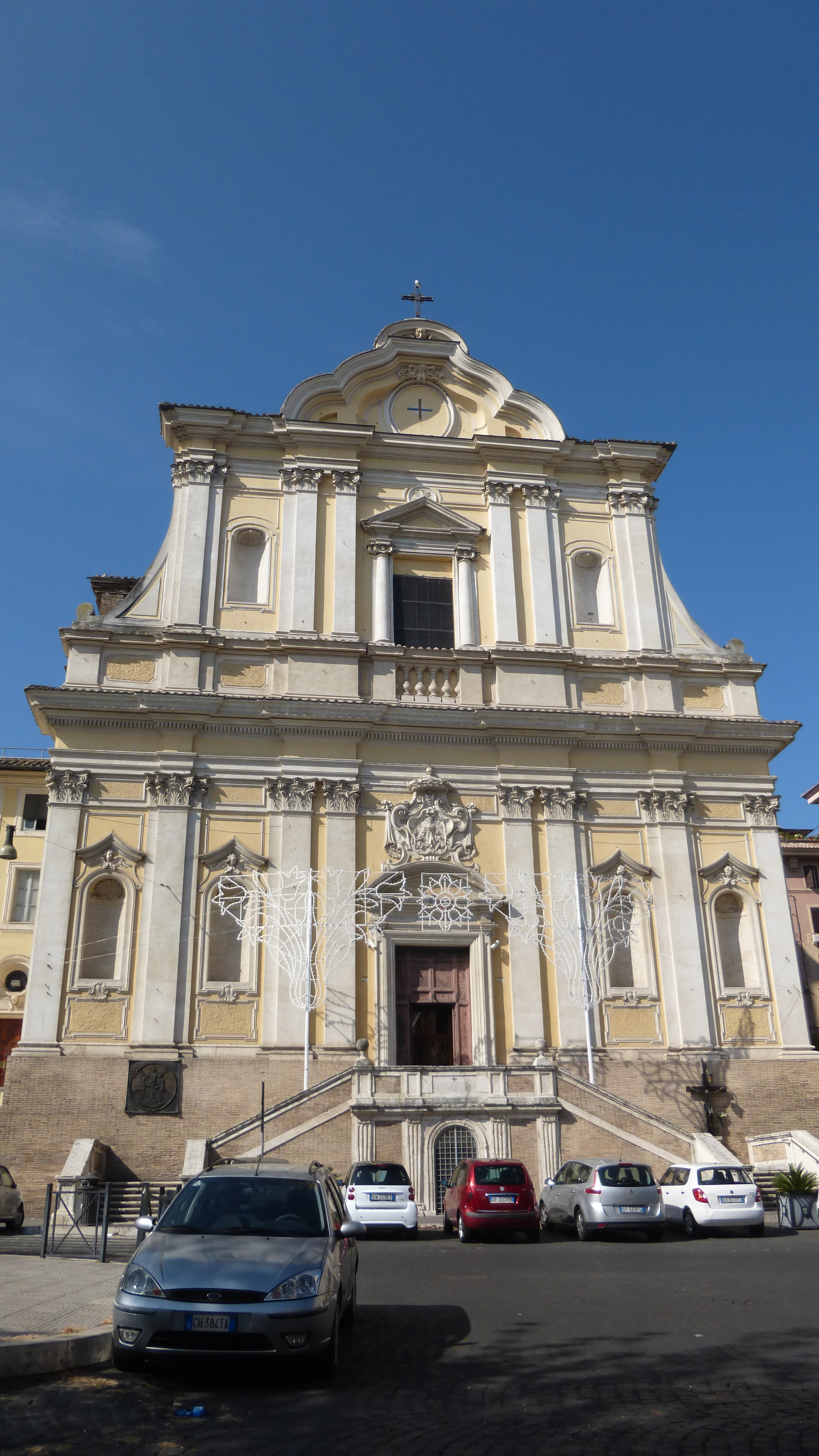 Roma, S. Maria delle Fornaci, facciata.